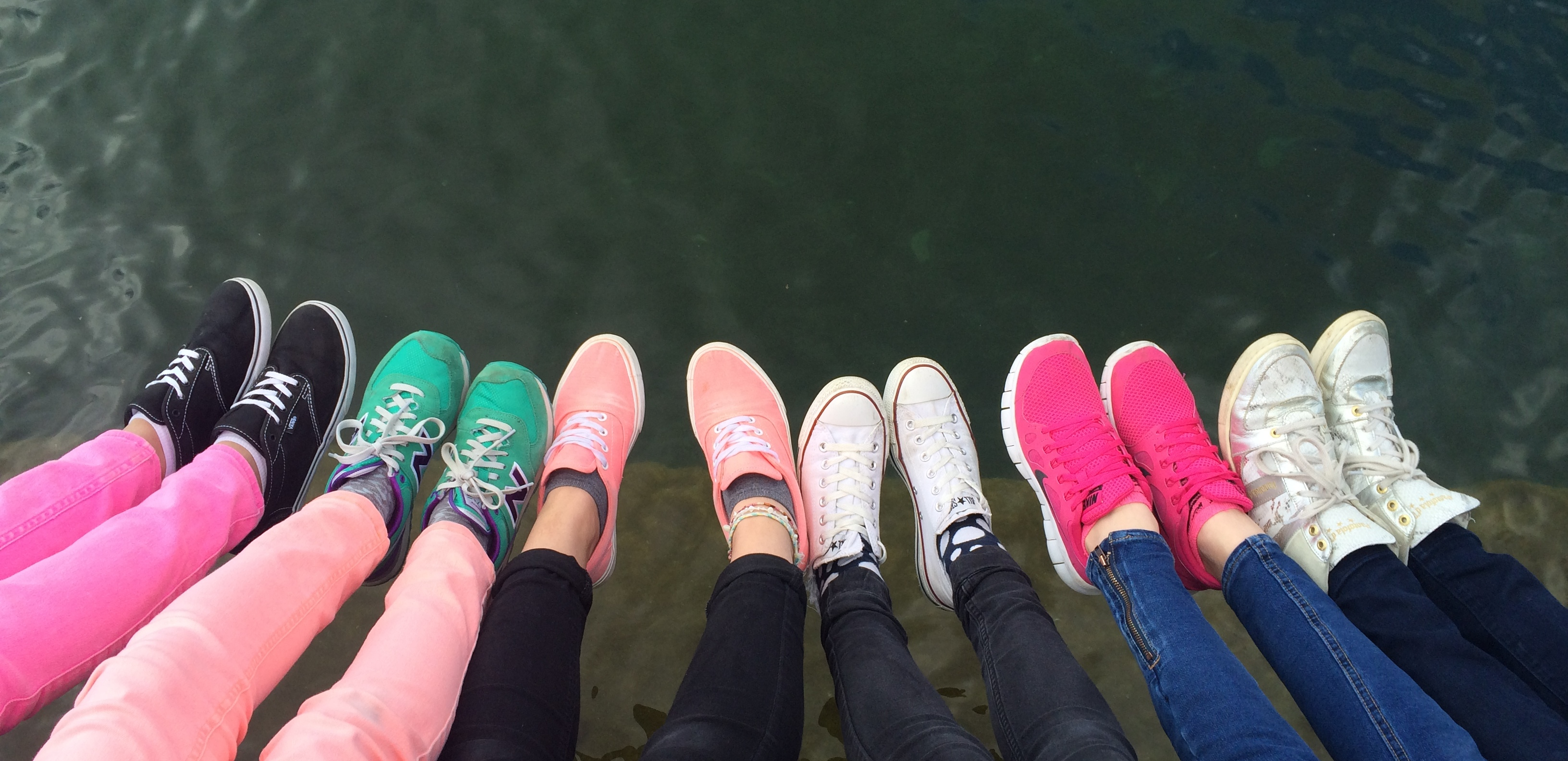 Sneakers